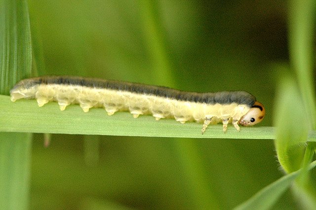 Dolerus nitens from Commanster, Belgian High Ardennes .